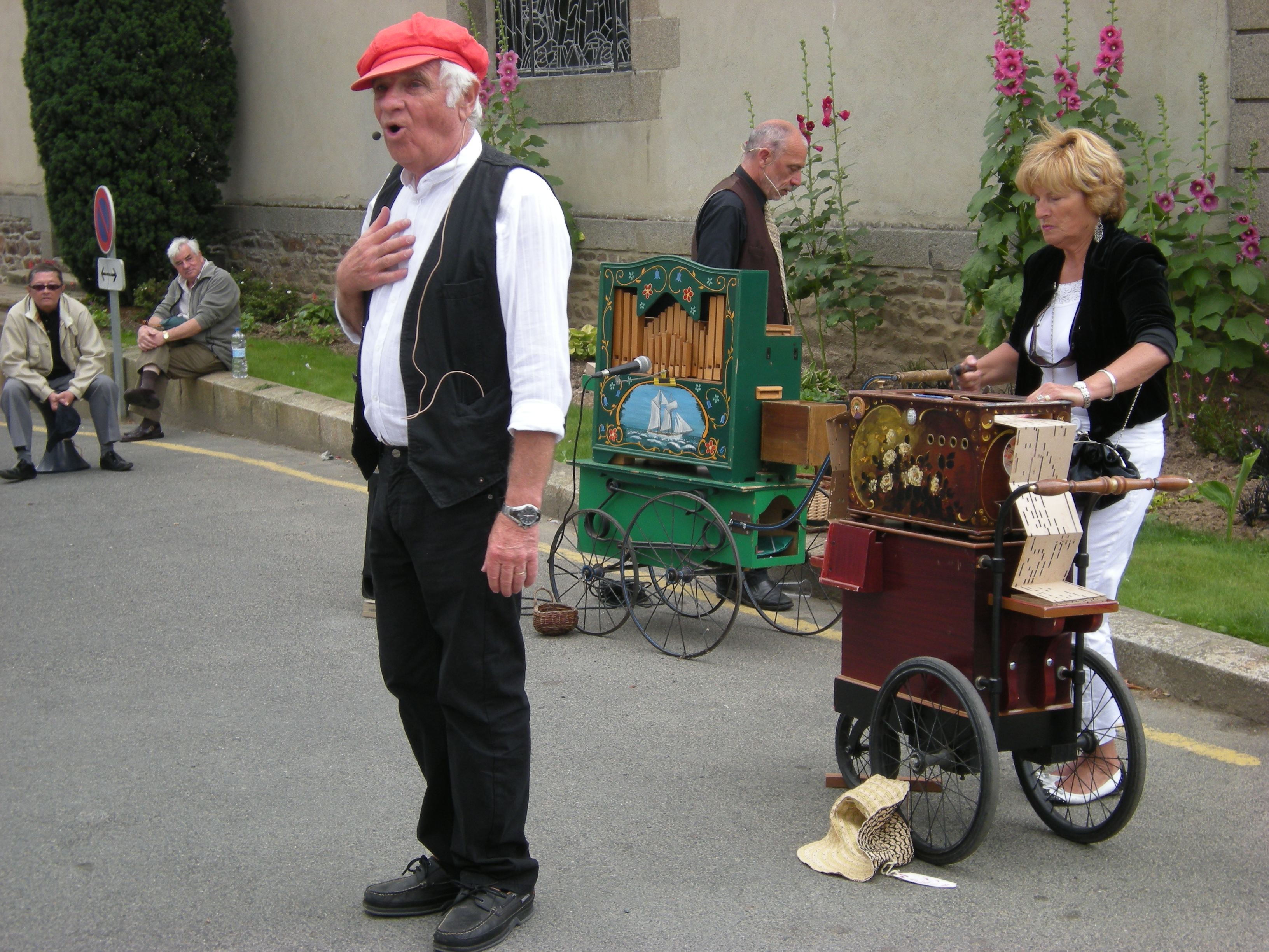 Bernard Beaufrère au Festival de musique mécanique de Pontrieux, 2009